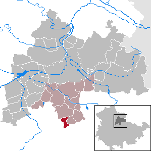 Kleinmölsen in Thuringia - District Sömmerda